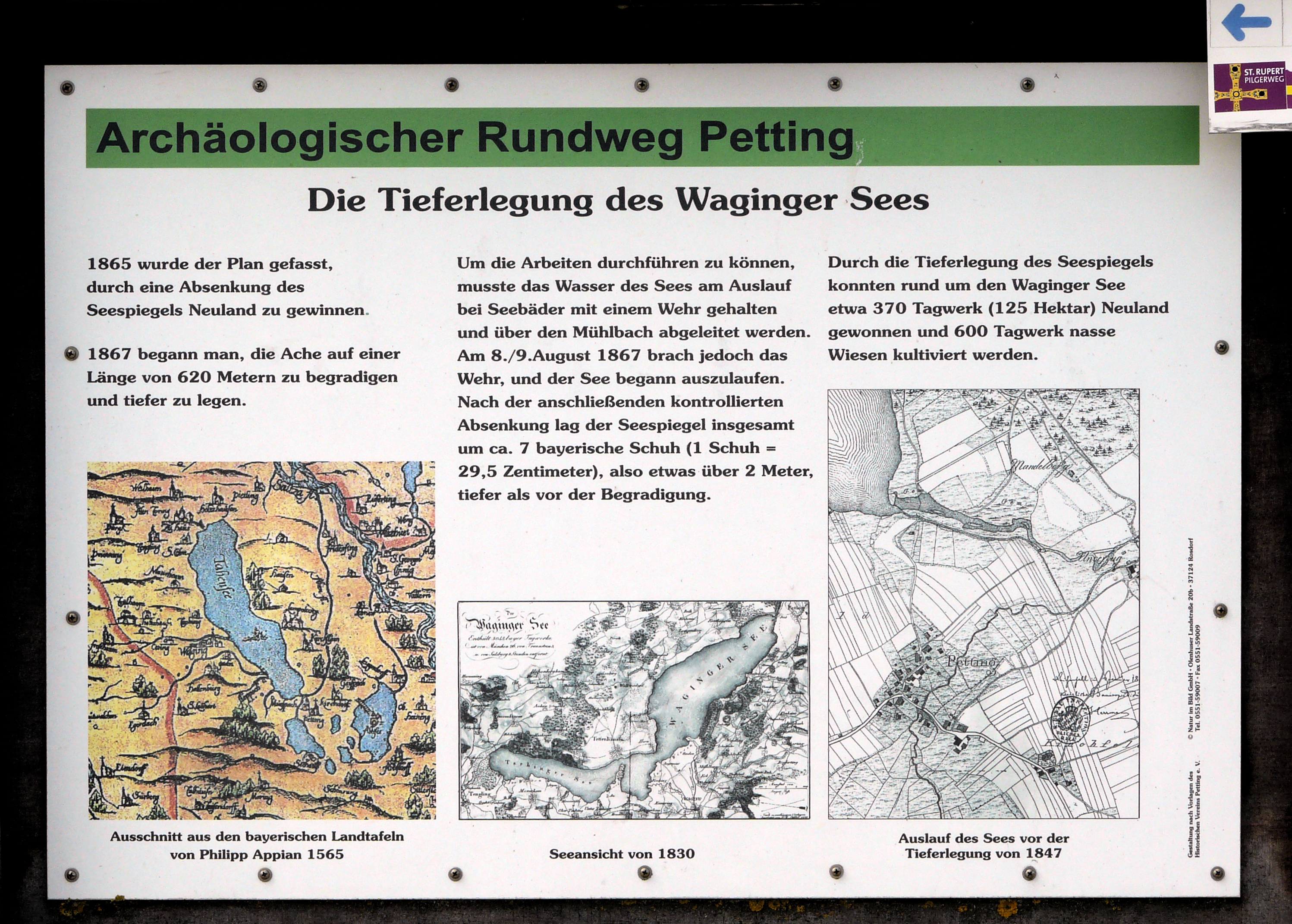 Hinweistafel -Archäologischer Rundweg Petting-, beschrieben wird die Tieferlegung des Waginger See